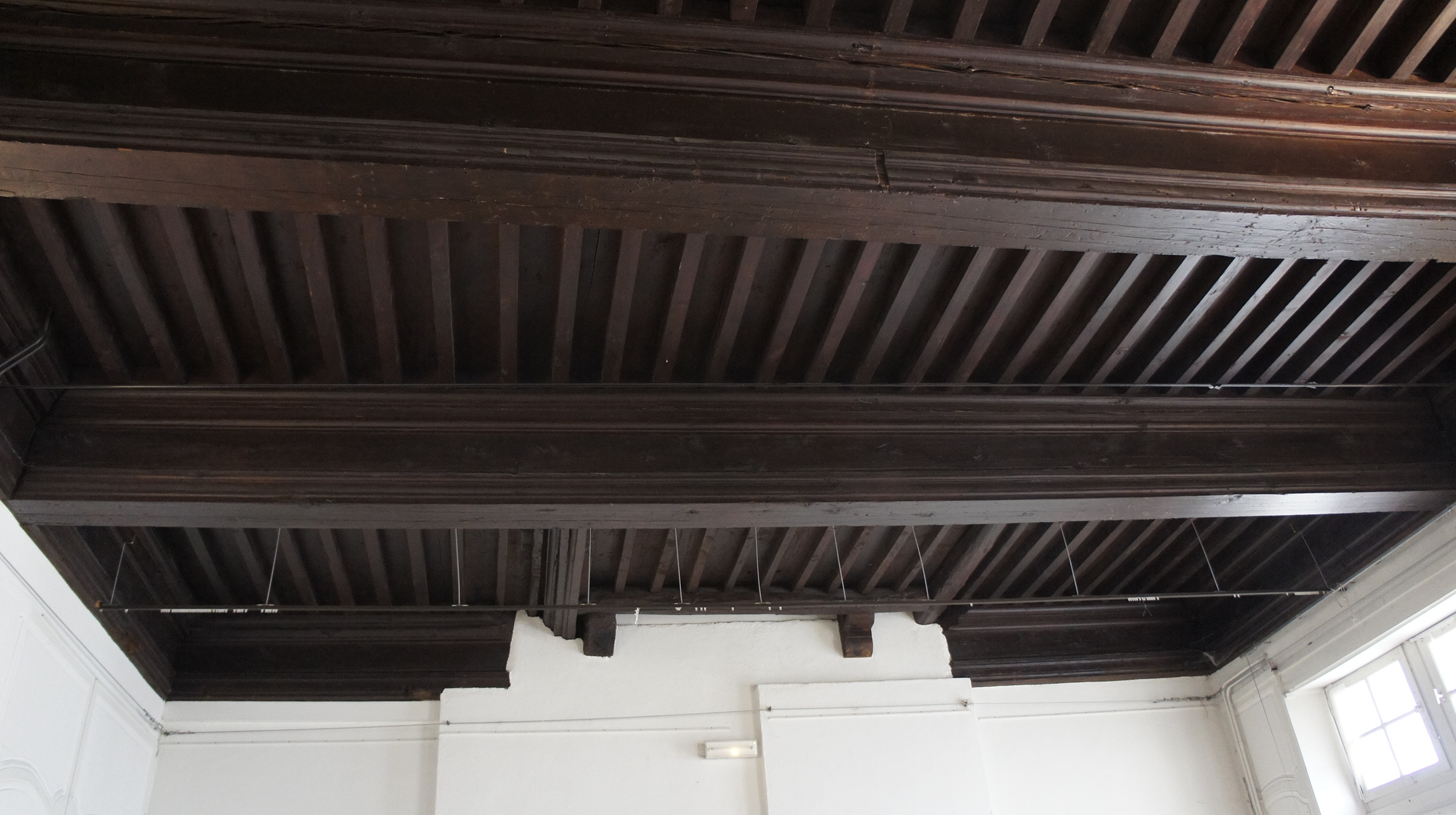 Salle 1e étage de la MJC Lillebonne .